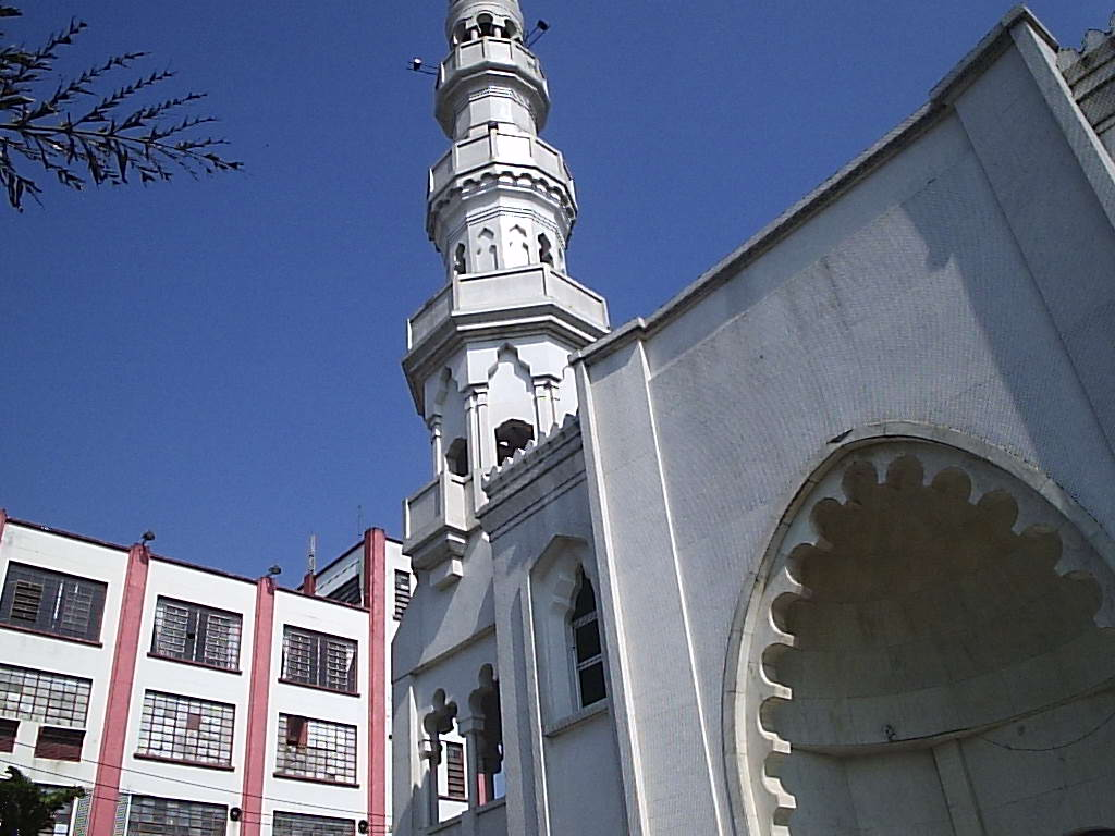 Foto da entrada da primeira mesquita brasileira (Mesquita Brasil, na Avenida do Estado, cidade de São Paulo).